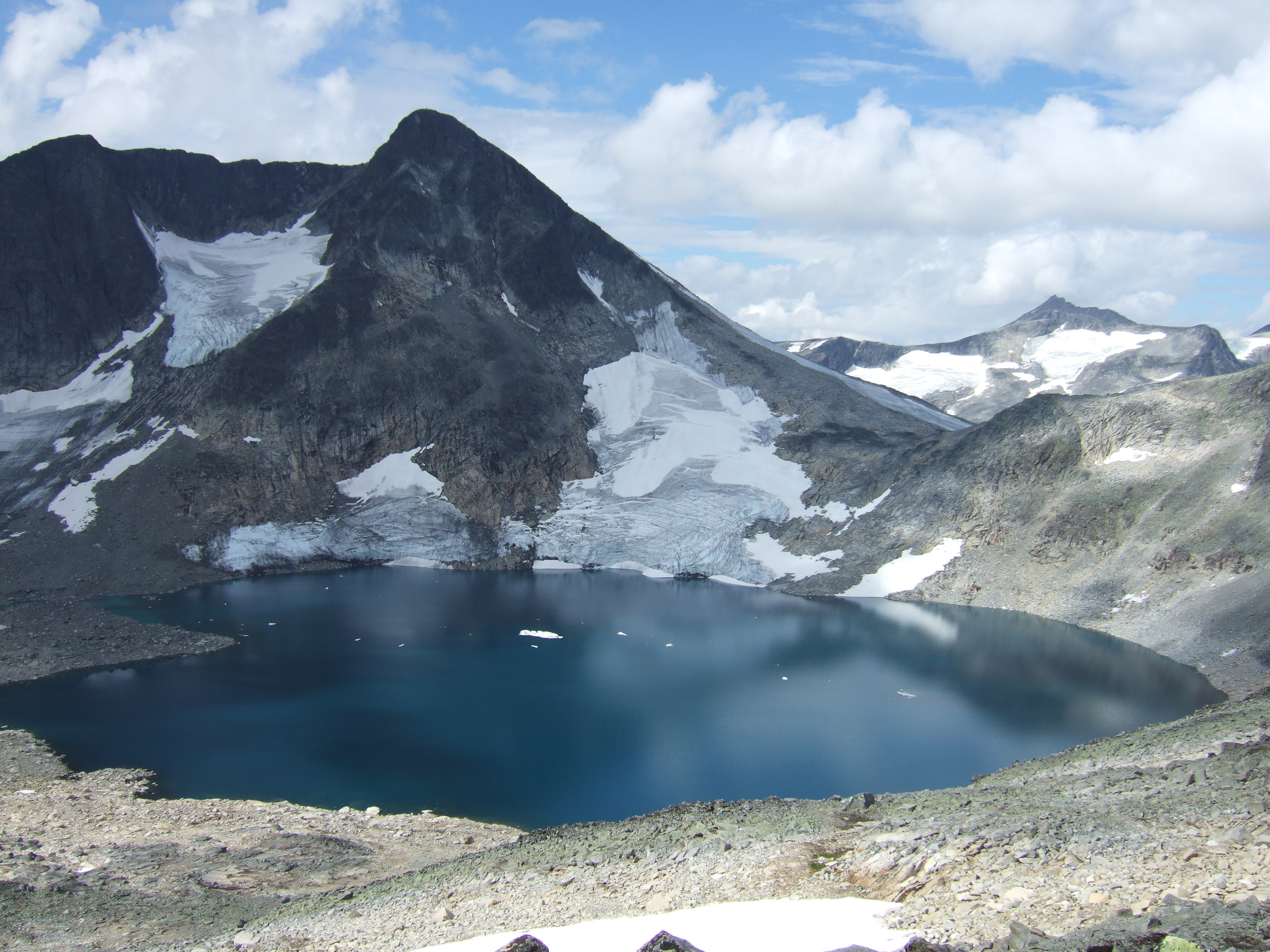 Semeltind sett fra Hinnåtefjellet med Semelbreatjønne i forgrunnen, Jotunheimen.